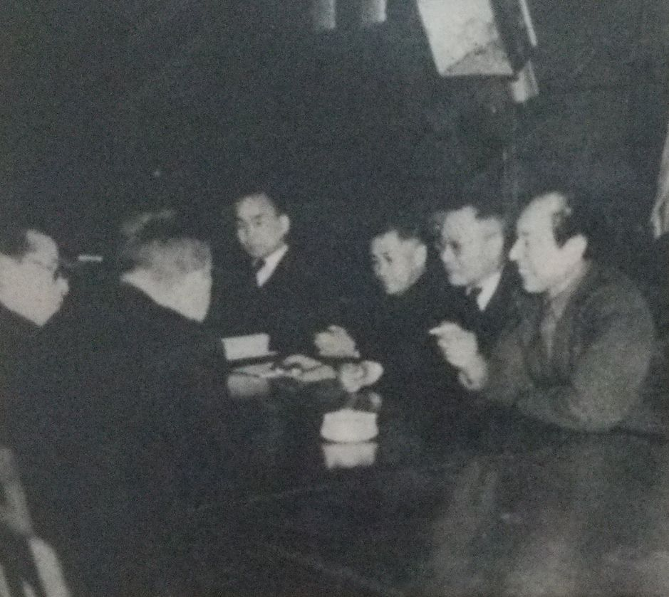 二・一ゼネスト突入直前、当局と折衝を行う徳田球一（右端）と末弘厳太郎（右から3番目）